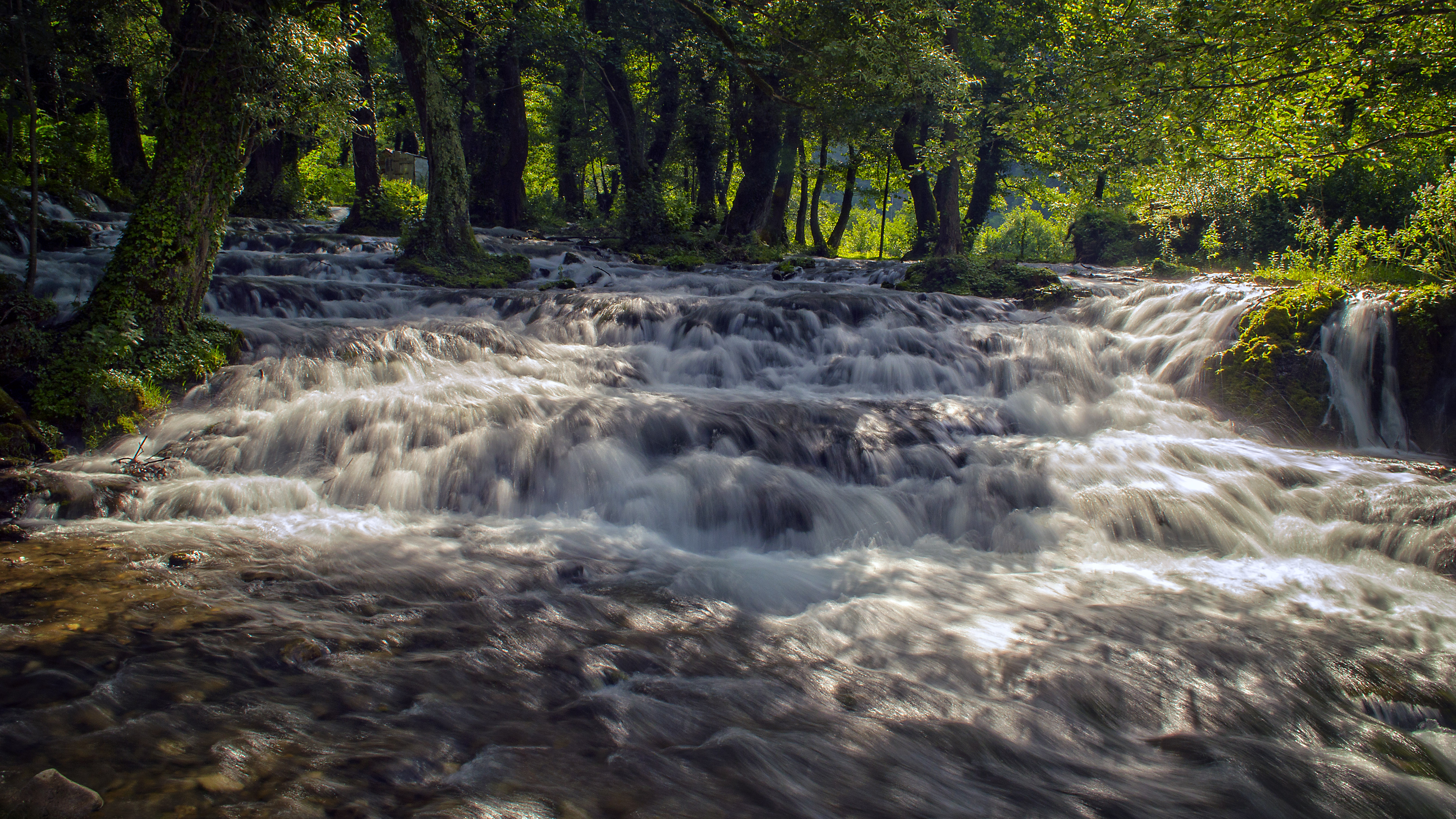 Janjska Otoka, Opština Šipovo. Сликава е подигната во рамките на проектот „По трагата на душата 2015“.